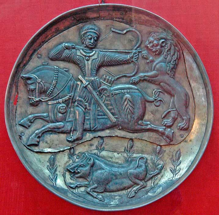 گراز بر روی یک بشقاب ساسانی